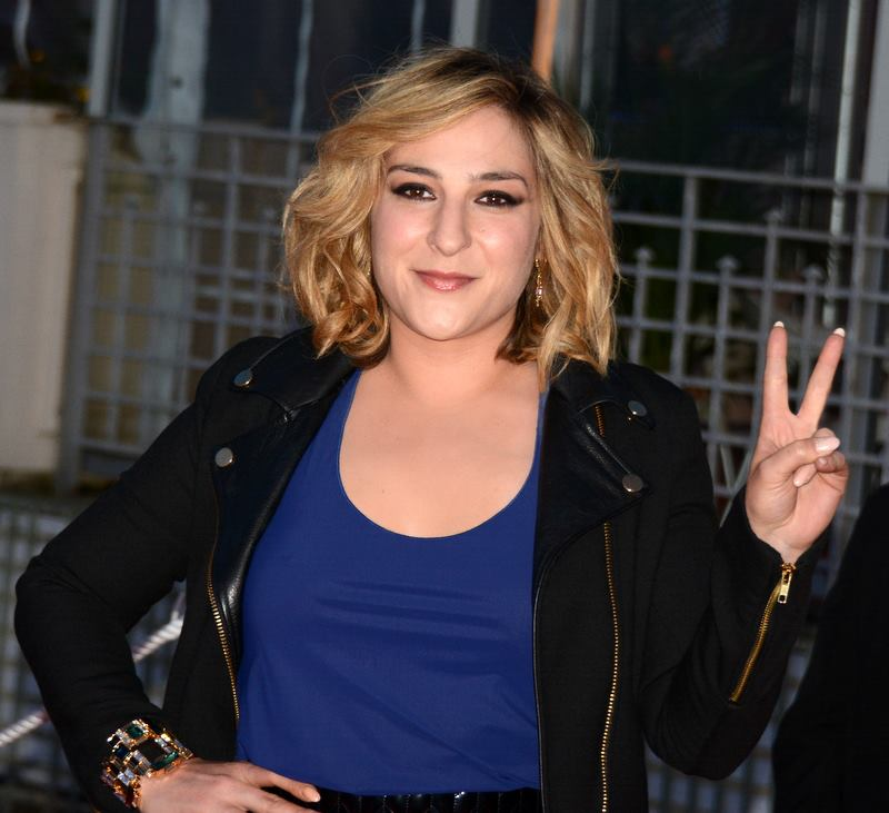 Marilou Berry au festival du film de Cabourg